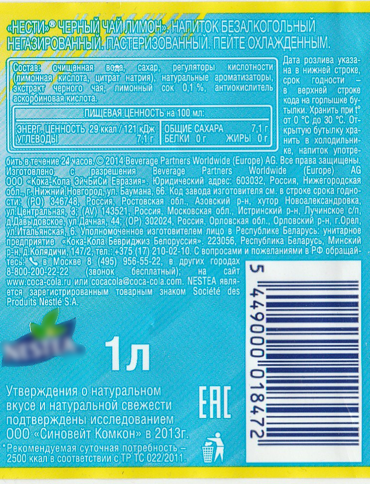 Состав холодного чая Nestea, обертка бутылки Nestea Lemon 1 Л, 2016